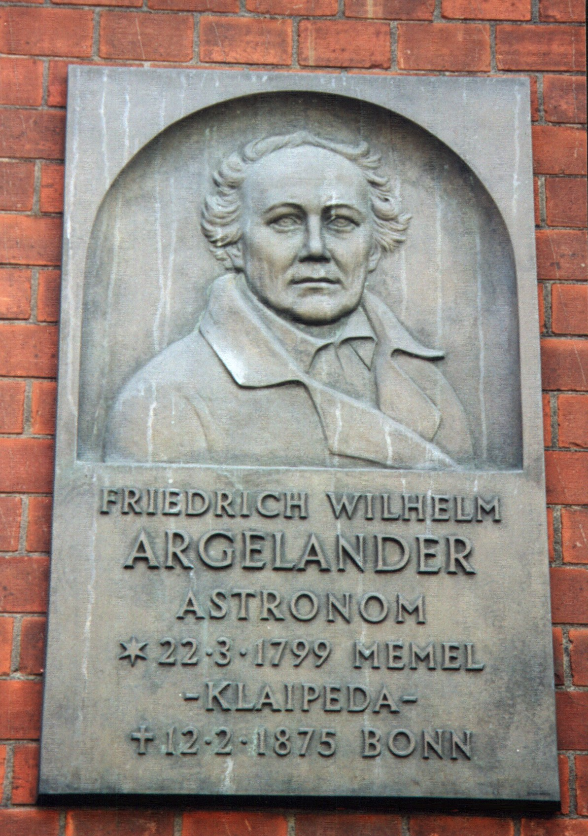 Gedenktafel an den Astronomen Argelander in Klaipeda